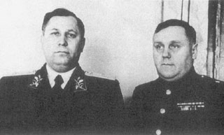 1940년대 평양 소련군정 시기의 테렌티 스티코프 중장(좌)과 니콜라이 레베데프 소장(우)